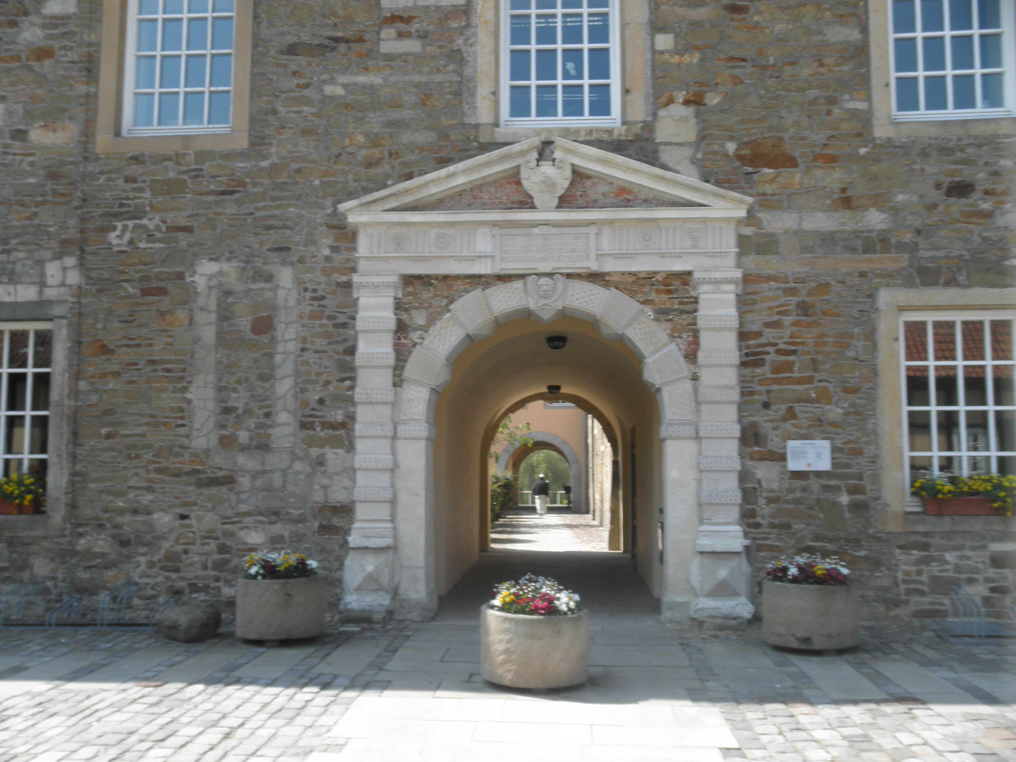 Kastela pordego Fürstenau